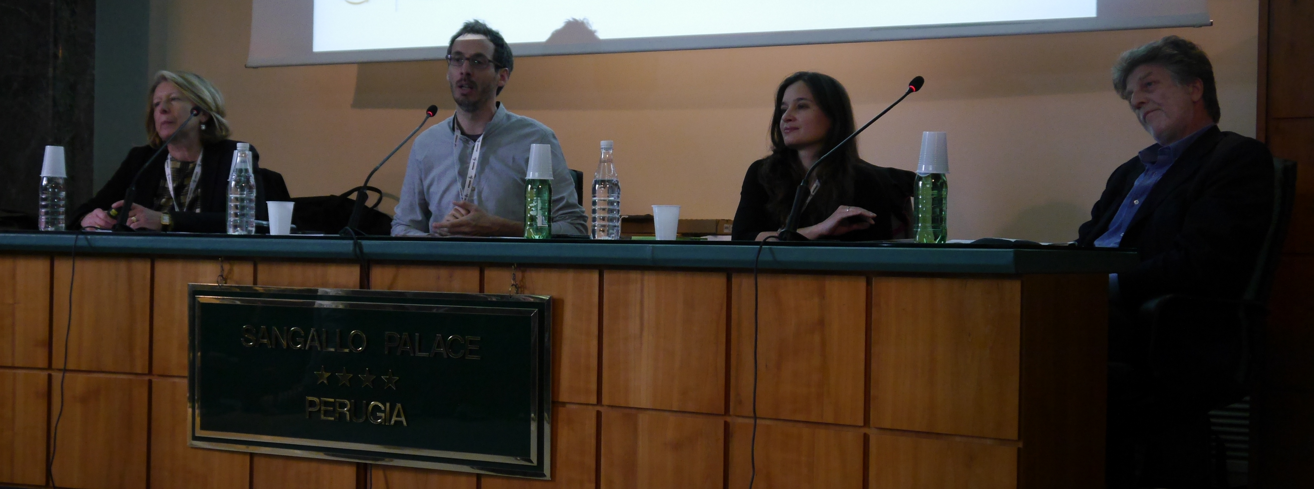 Adriana Cerretelli, Federico Taddia, Ewelina Jelenkowska-Lucà e Dino Pesole al festival internazionale del giornalismo 2015 This photo was taken with Panasonic Lumix DMC-G6 camera, thanks to Panasonic.You can see all photographs in category: Taken with Panasonic Lumix DMC-G6.